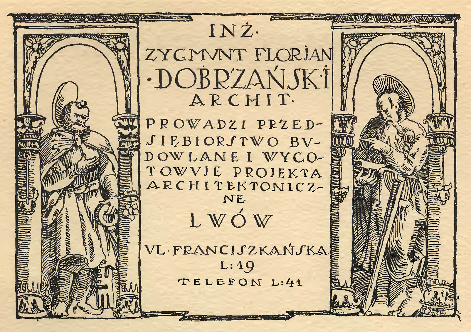 Реклама архітектора Зигмунта Добжанського (1876—1918) у часописі Rocznik Architektoniczny 1913/1914.